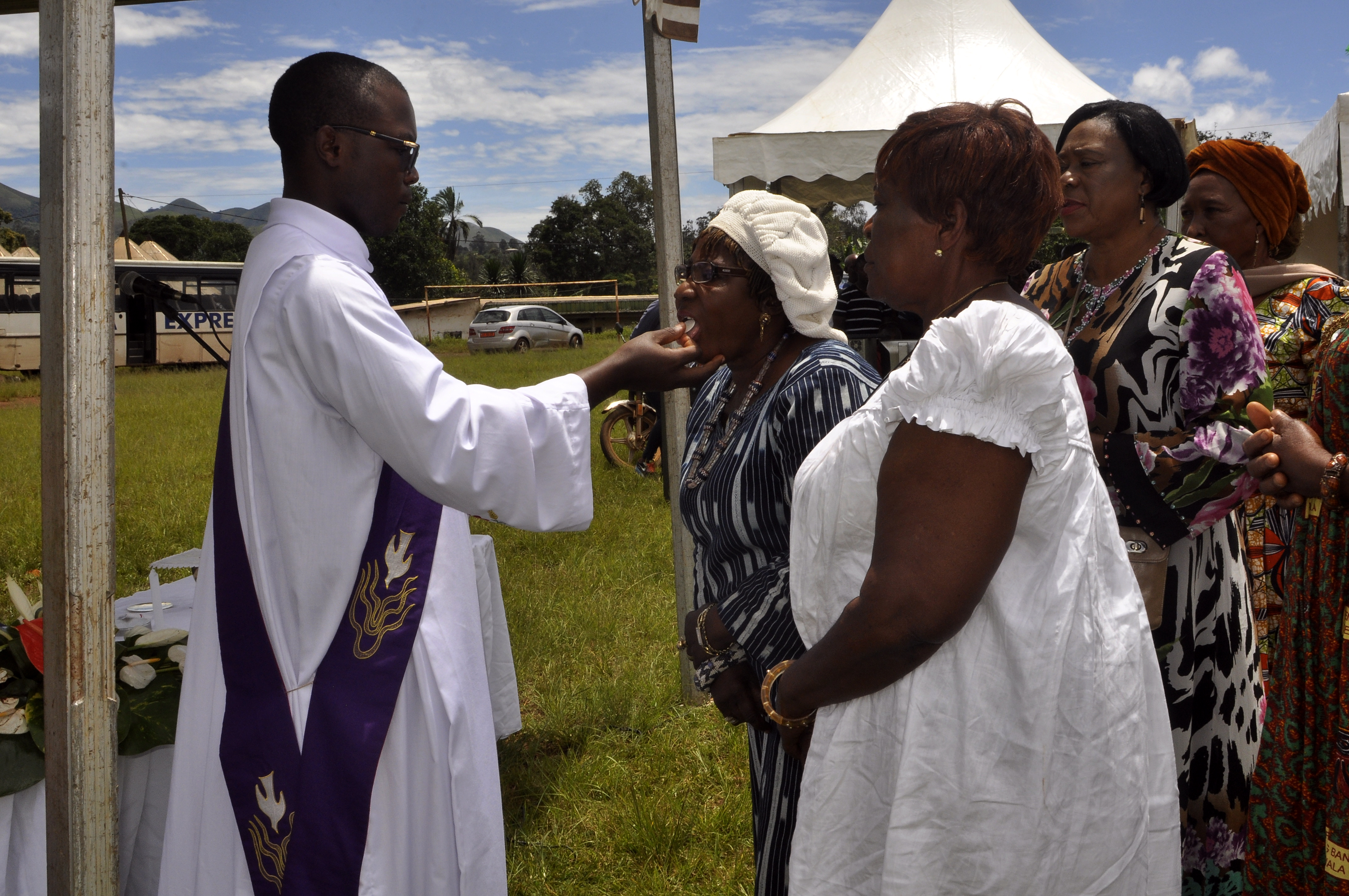 Prêtre donnant la communion à des chretiennes This is an image of "African people at work" from Cameroon